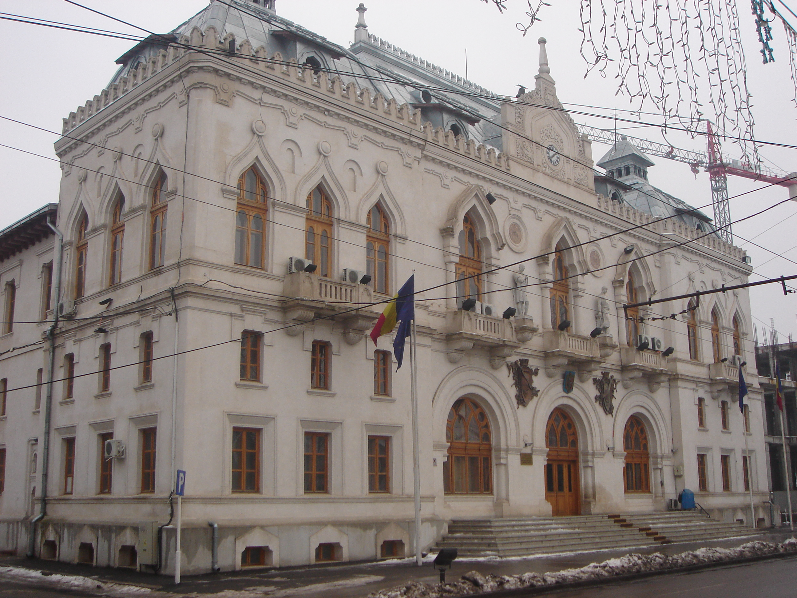 Palatul Administrativ din Galați. Clădirea-monument istoric a fost votată de către gălățeni ca fiind noul simbol al orașului. Edificiul a fost realizat după planurile arhitectului Ion Mincu. Pe partea frontală tronează două statui care simbolizează Industria și Agricultura.